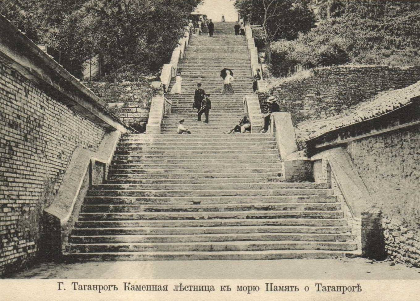 Каменная лестница, Таганрог Ростовская область РФ